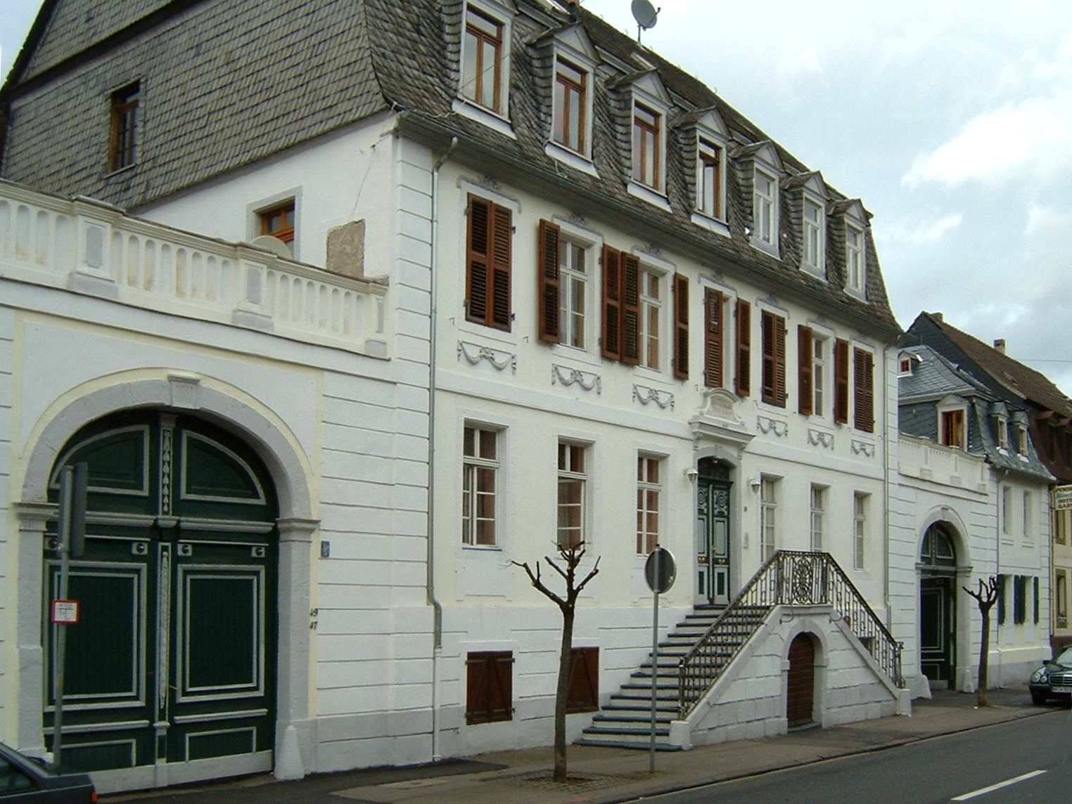 Haus von David Roentgen in Neuwied